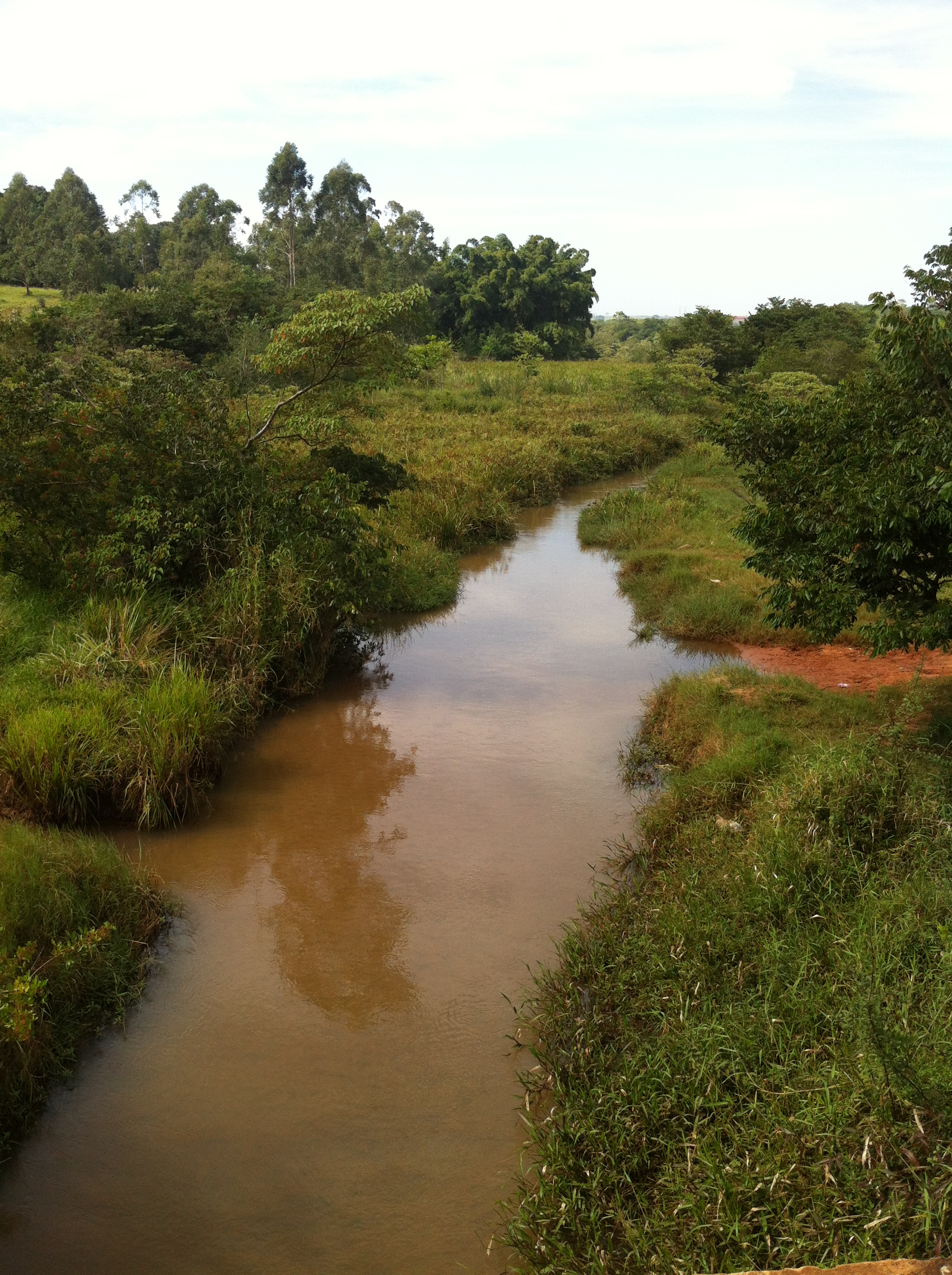 Ponte sobre o Rio Batalha, Bauru-Sp.